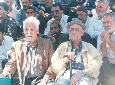 پهلوان ابوالقاسم سخدری در کنار پهلوان یعقوبعلی شورورزی در گود کشتی باچوخه روستای حاجی‌آباد زبرخان| عکس از آلبوم شخصی علی حاجی‌آبادی